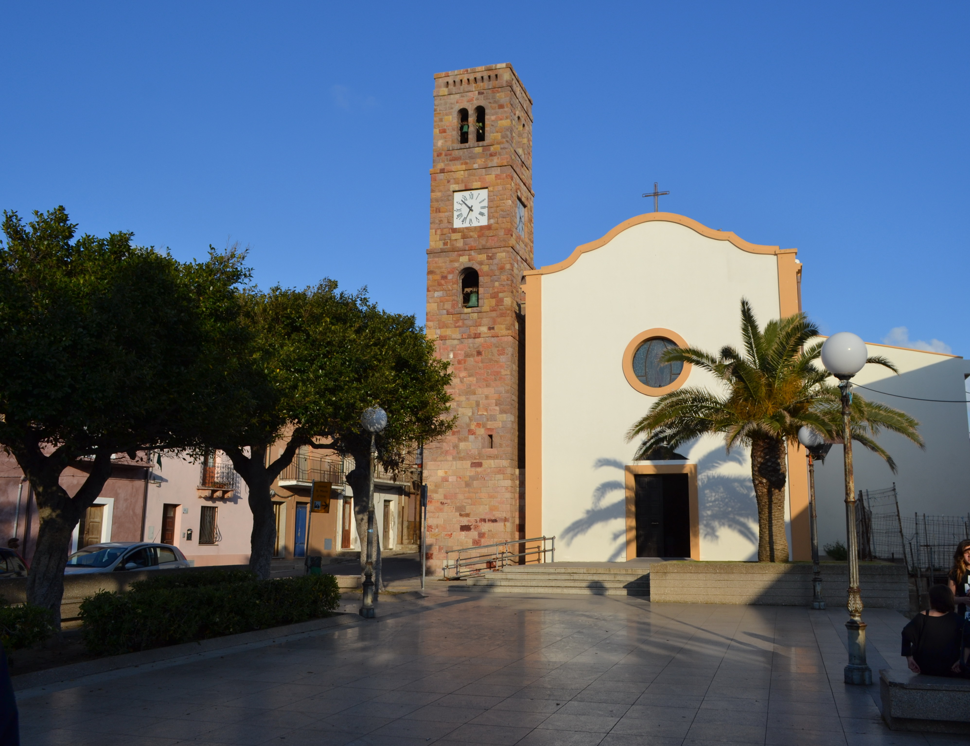 Chiesa di Santa Maria d'Itria Portoscuso